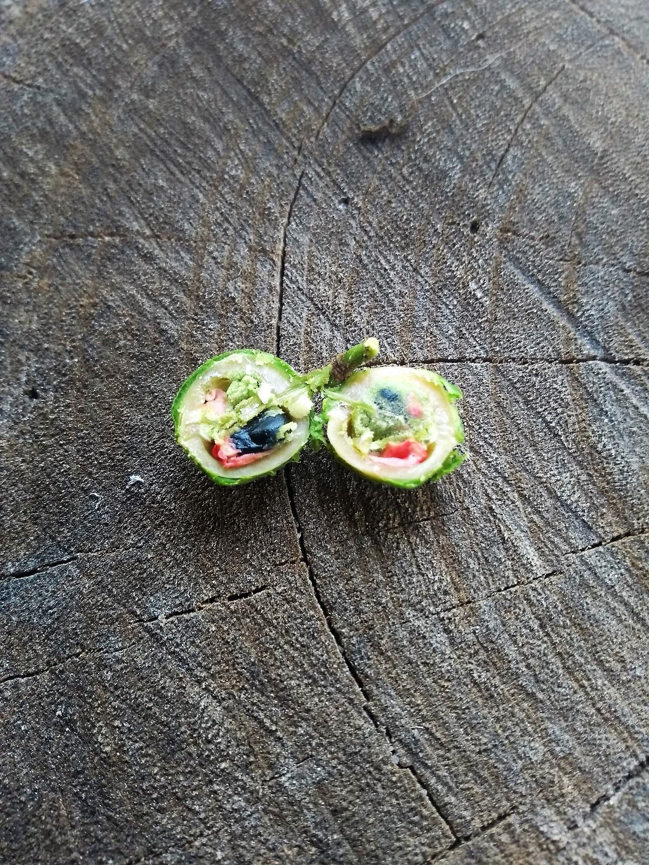 Fruto aberto de Tabocuva em estado de maturação